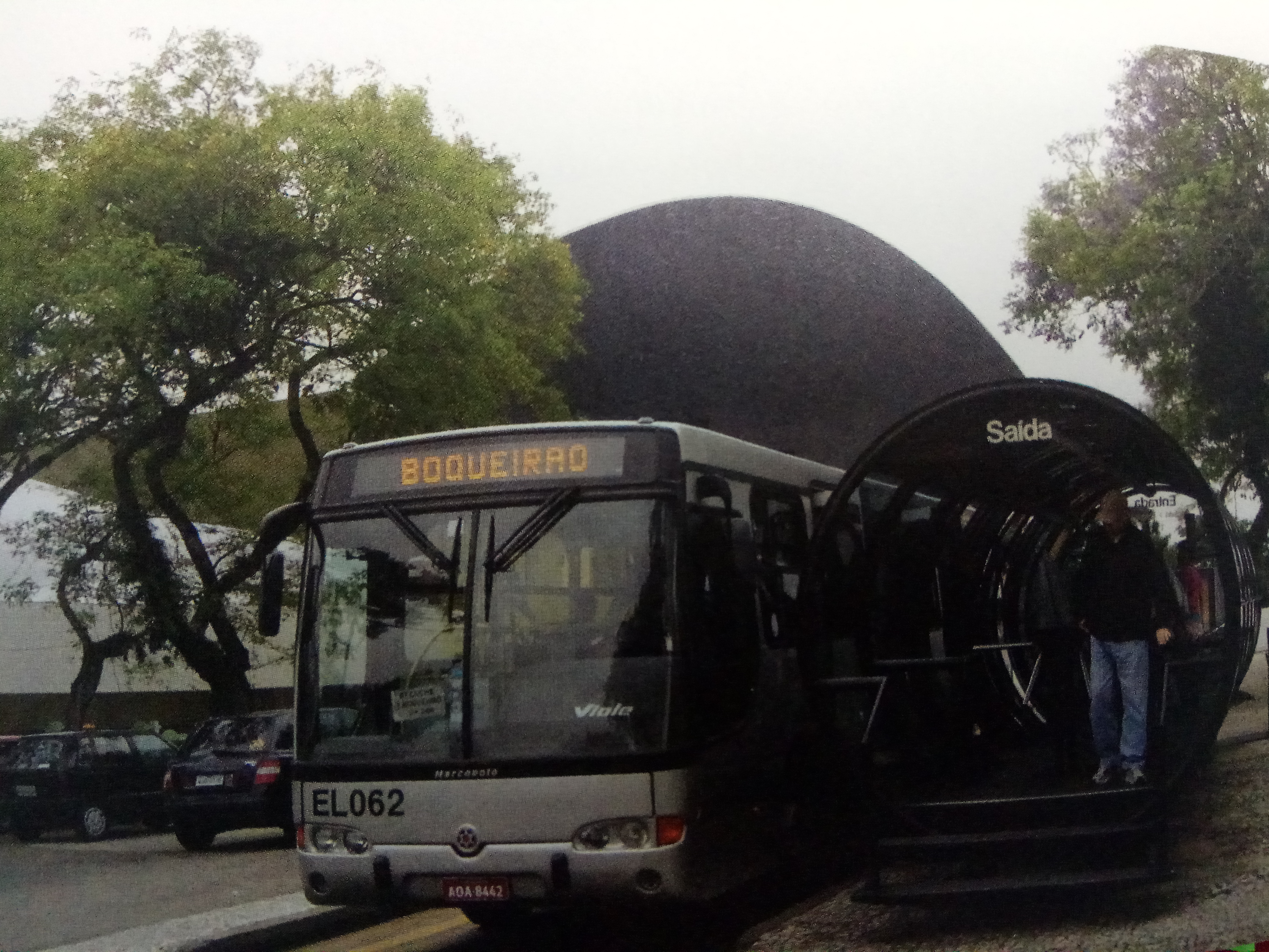 Foto : Mario R. Duran Ortiz